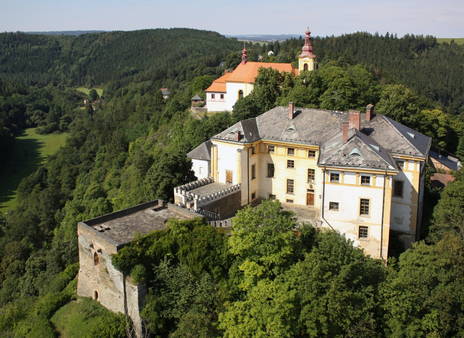 Pohled z nebe na Rabštejn nad Střelou